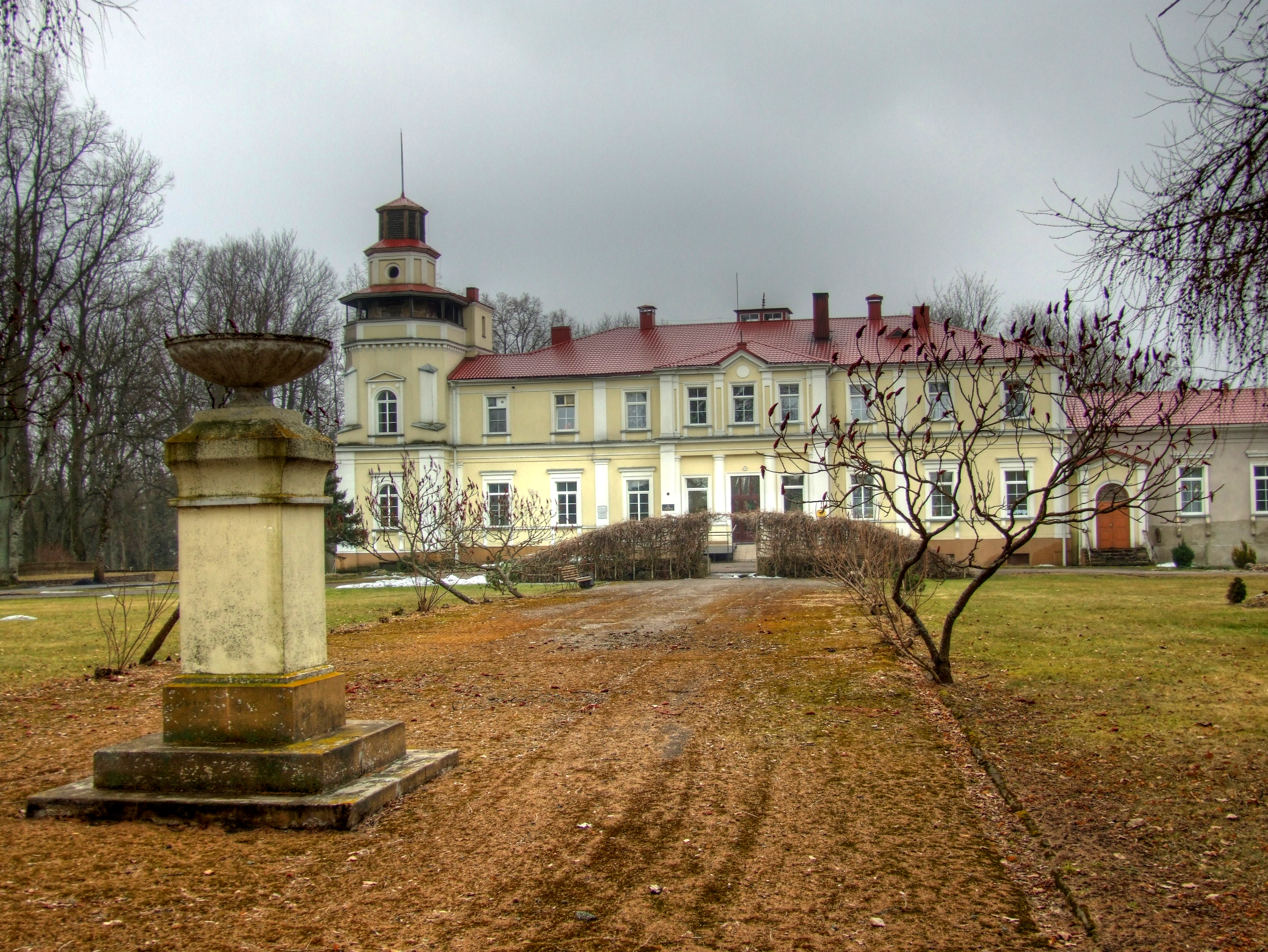 Pagružuvys manor house